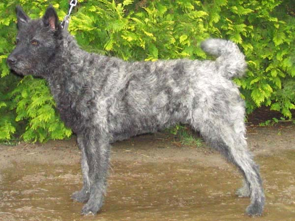 Hollandse herder ruwhaar.